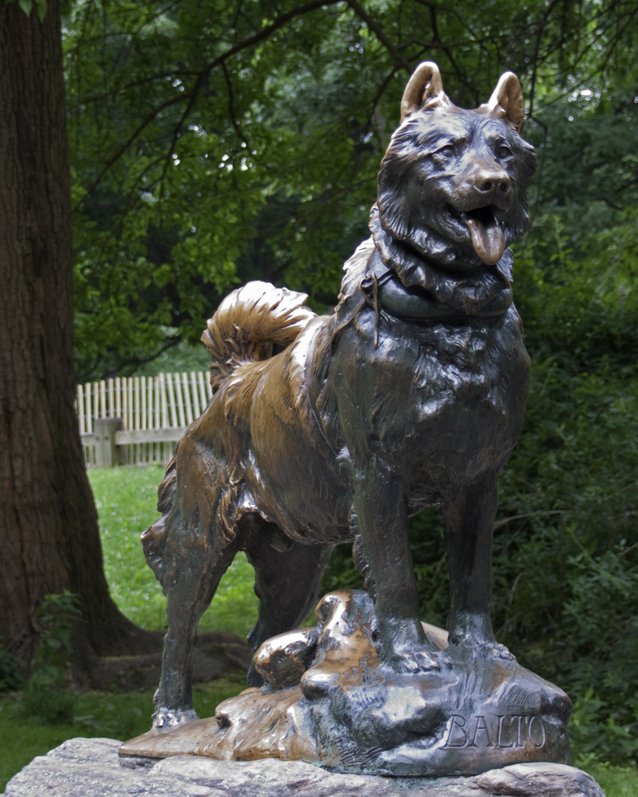 Balto